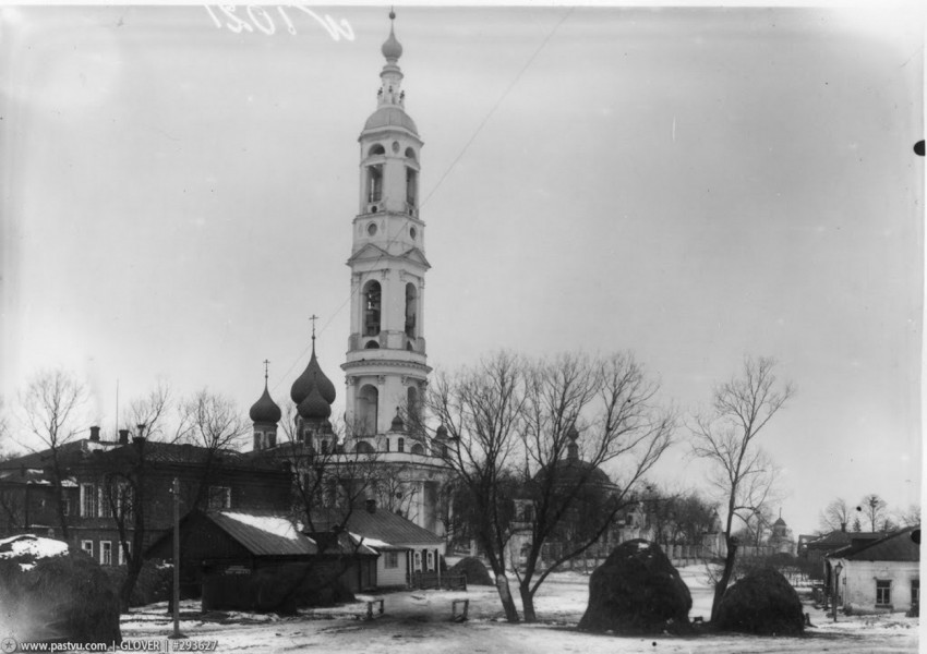 Церковь Никиты Мученика (Поречье-Рыбное), колокольня церкви.